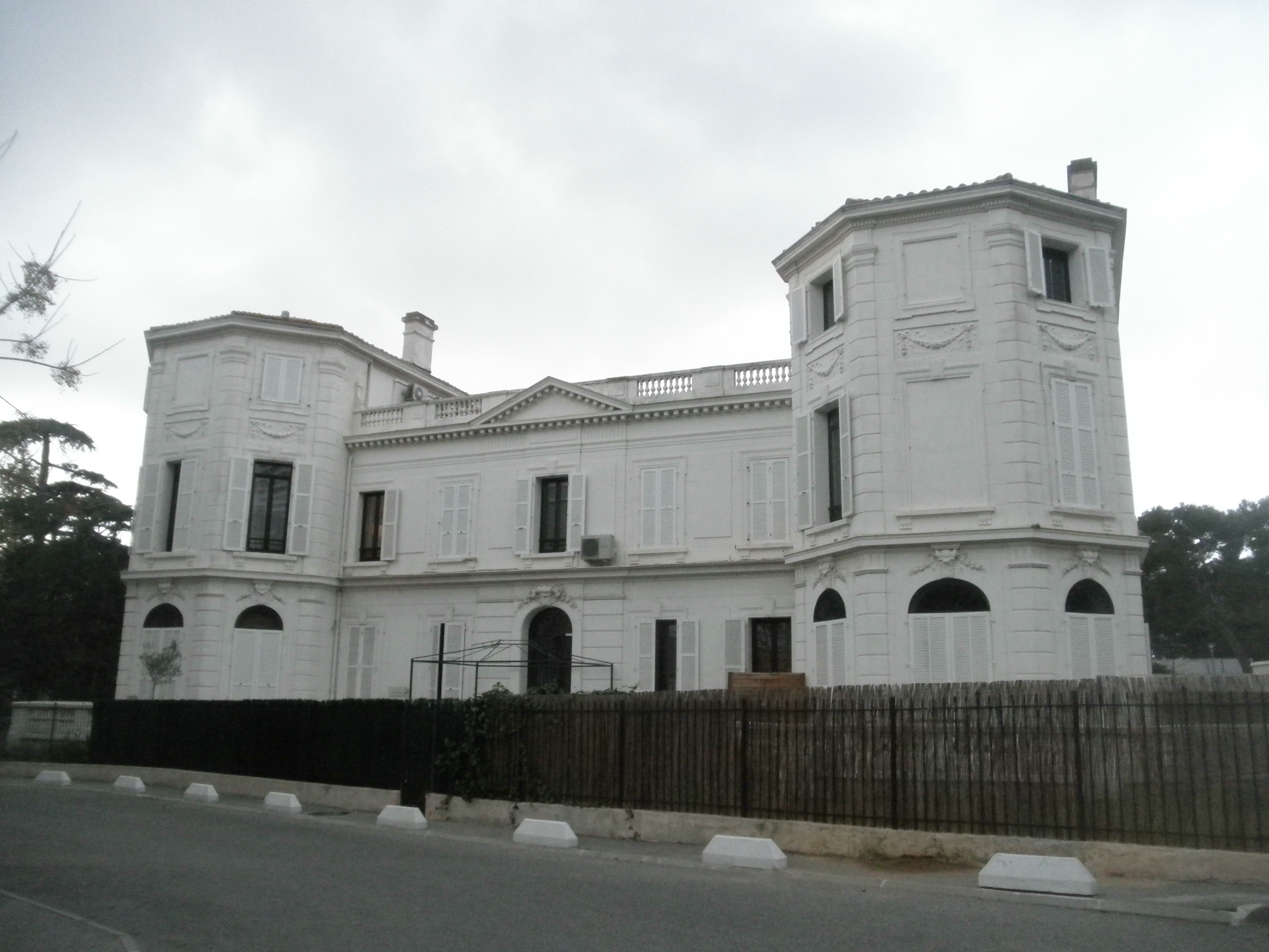 La Rouvière 2014